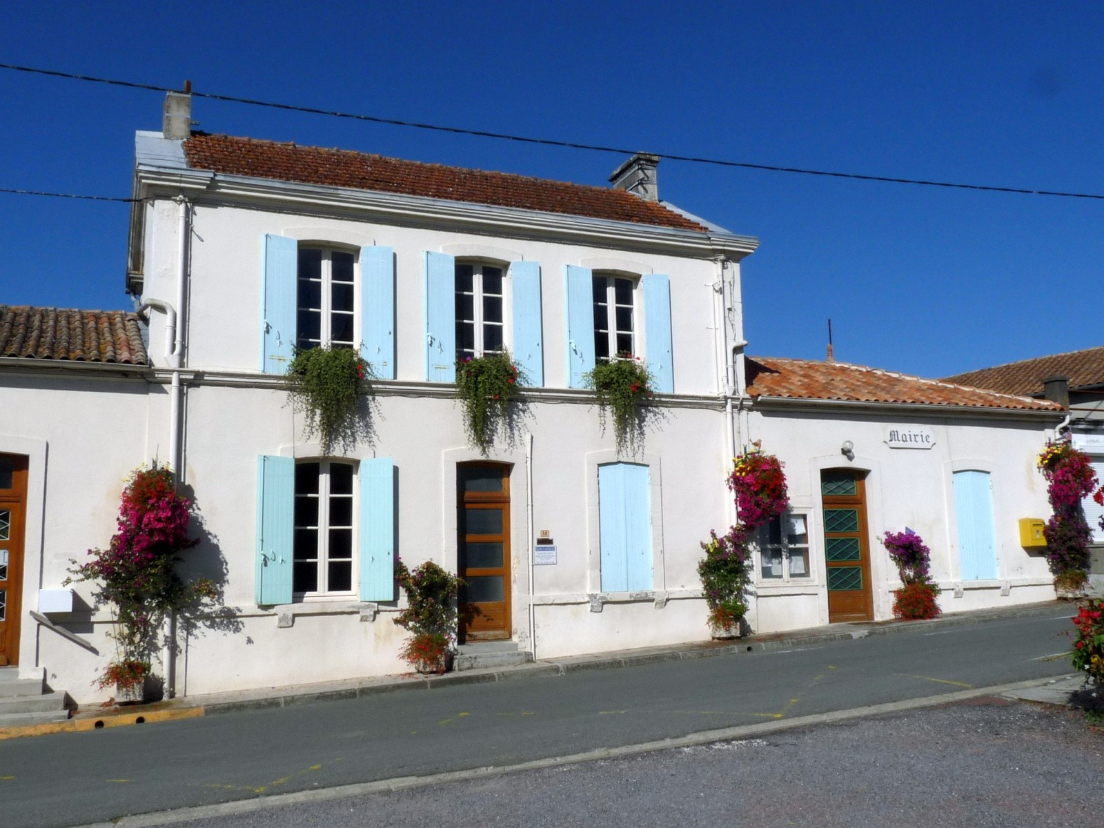 Mairie d'Arthenac, Charente-Maritime, France